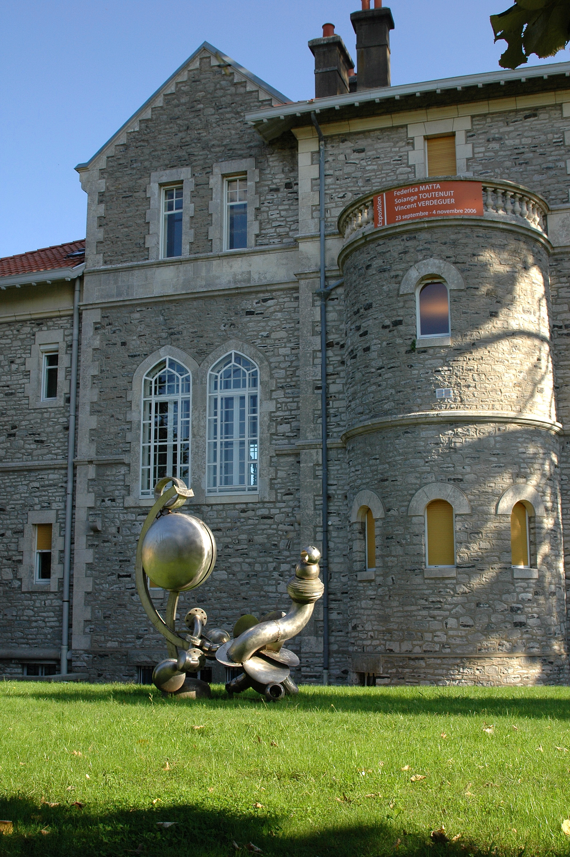 Anglet, la mairie et la fontaine Double flux de Claude Viseux (1927-2008). Photographie prise le 16 août 2006 par Harrieta171.